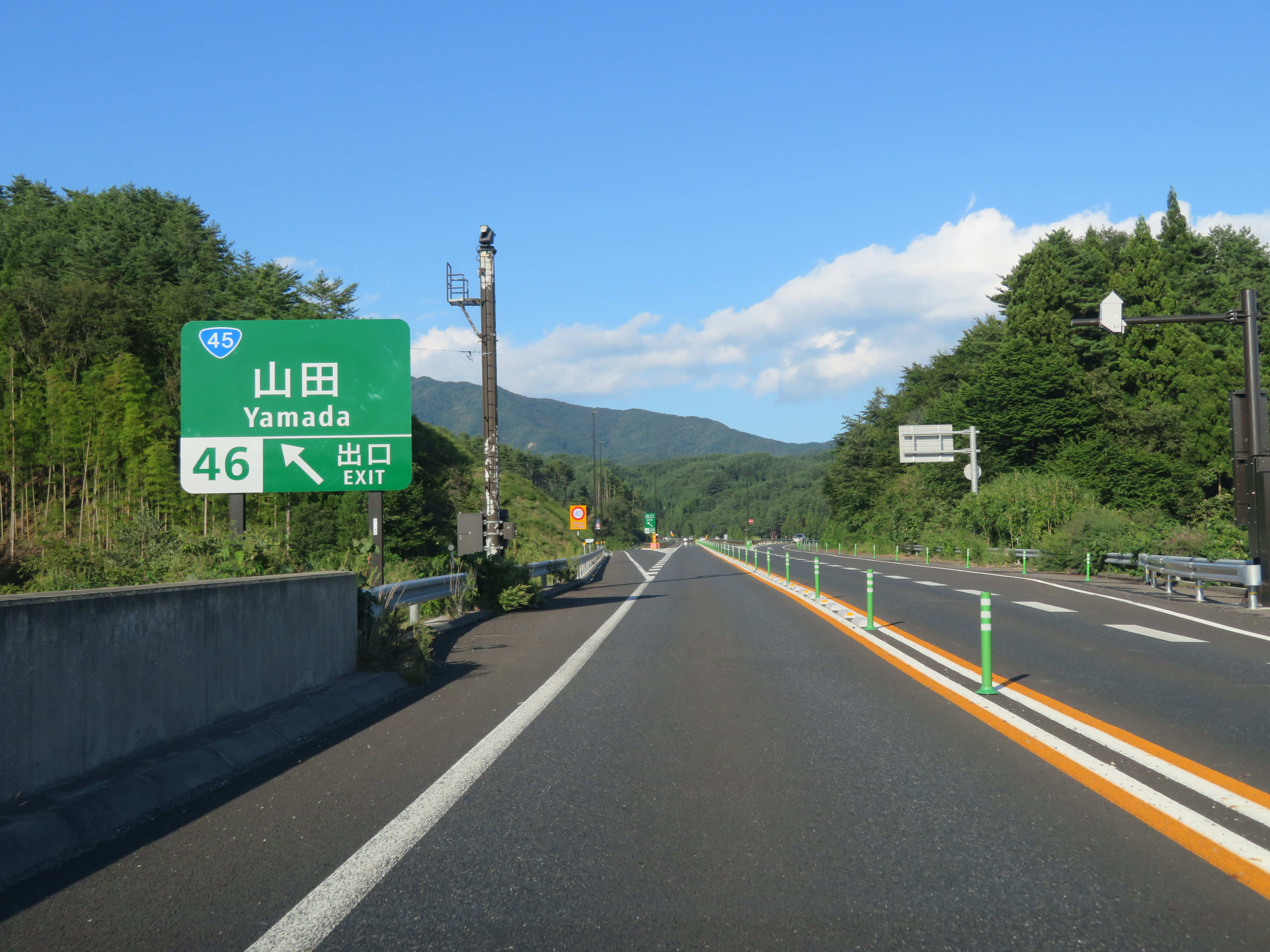 三陸自動車道山田インターチェンジ出口付近（釜石方面側から撮影） Canon PowerShot SX720 HS